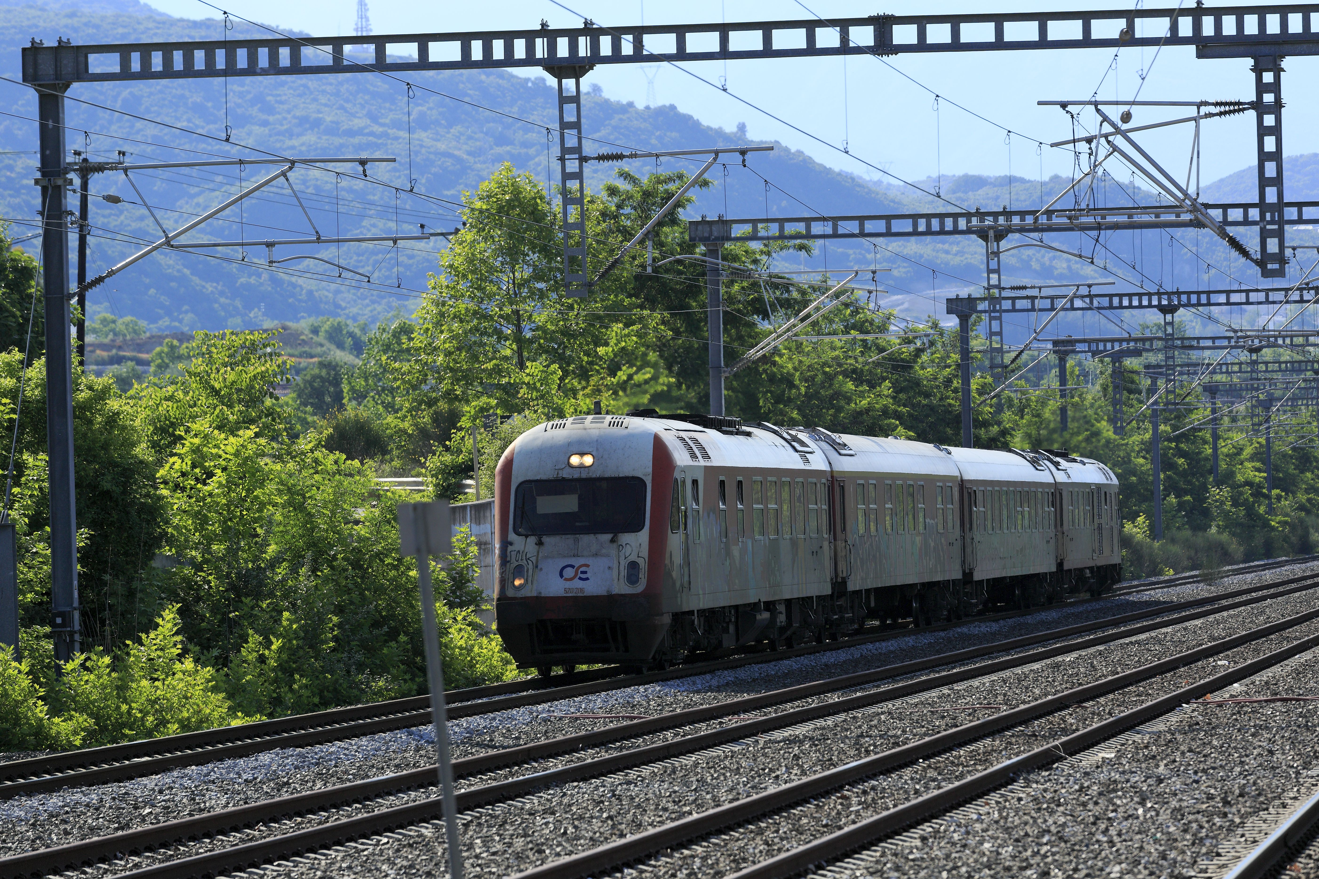 Vierteiliger LEW-MAN-IC-Triebzug, unterwegs von Thessaloníki nach Kalambáka über Paläofarsaos. Die einstigen Paradepferde der OSE sind inzwischen ziemlich heruntegekommen.